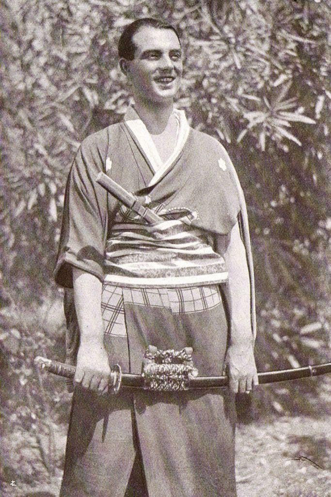 Arturo Ferrarin vestito con un kimono donatogli in Giappone al termine del raid Roma-Tokio